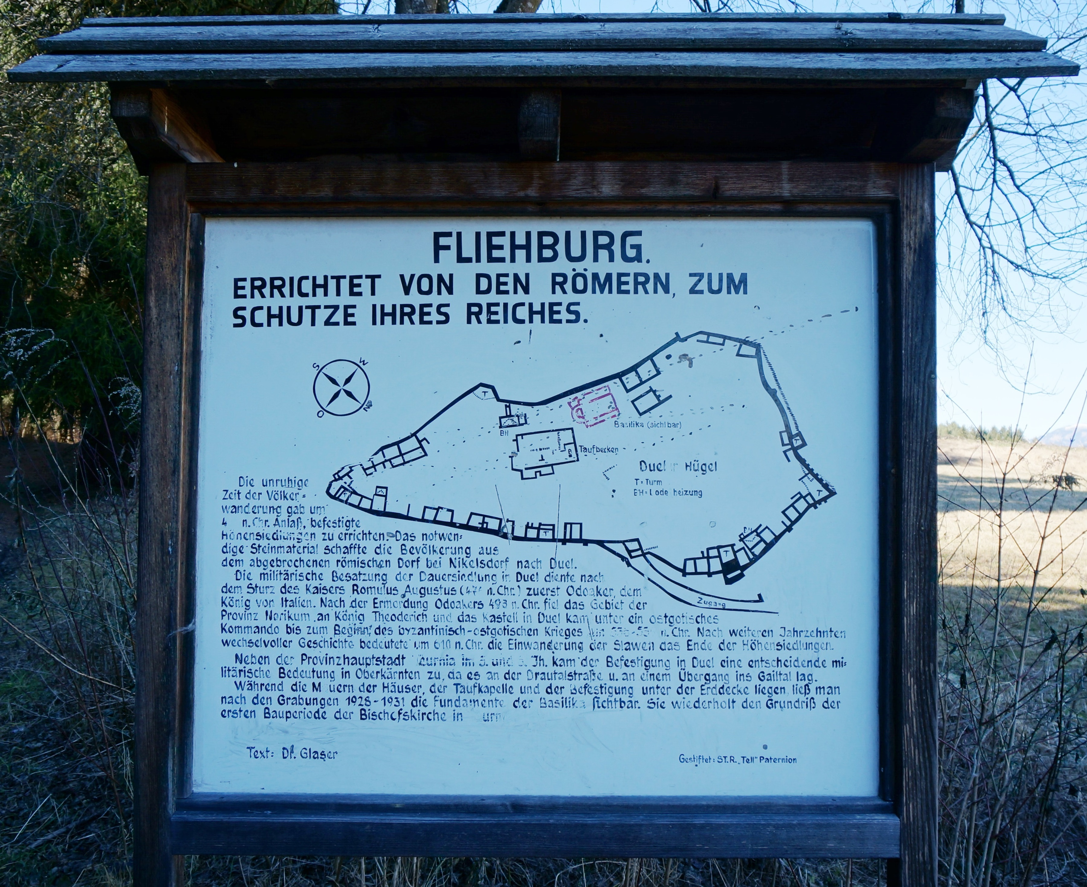 Spätantike Höhensiedlung Duel Reste der Fliehburg - spätantike Höhensiedlung der Römer in Nikelsdorf, Gemeinde Paternion, Bezirk Villach Land